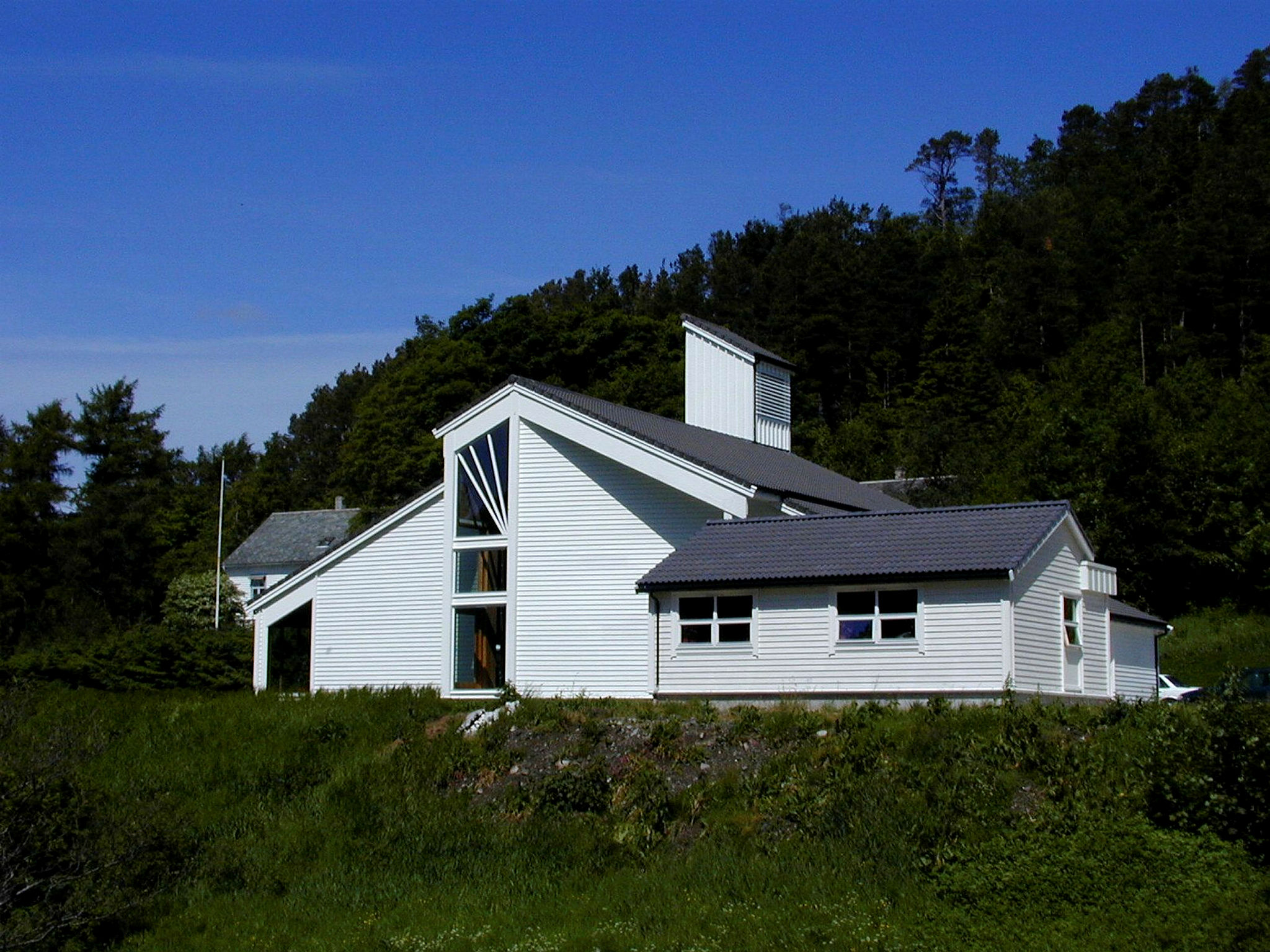 Larsnes kirke sett fra vest. Foto: Max Ingar Mørk. Fra Riksantikvarens Kulturminnebilder.